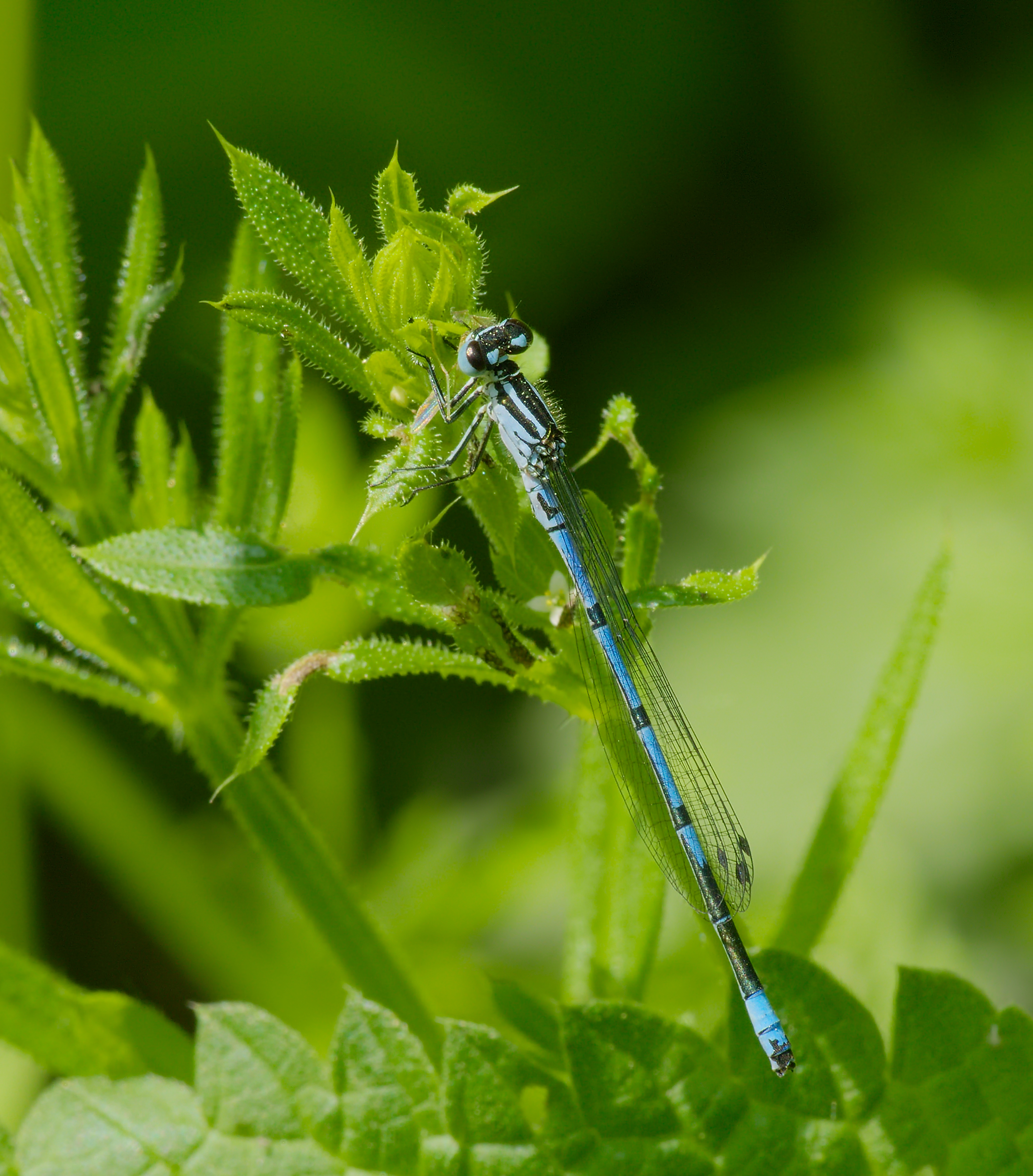 Hufeisen-Azurjungfer - Coenagrion puella, Männchen. Aufgenommen in Lampertheim-Süd beim Holländergraben, Hessen, Deutschland.